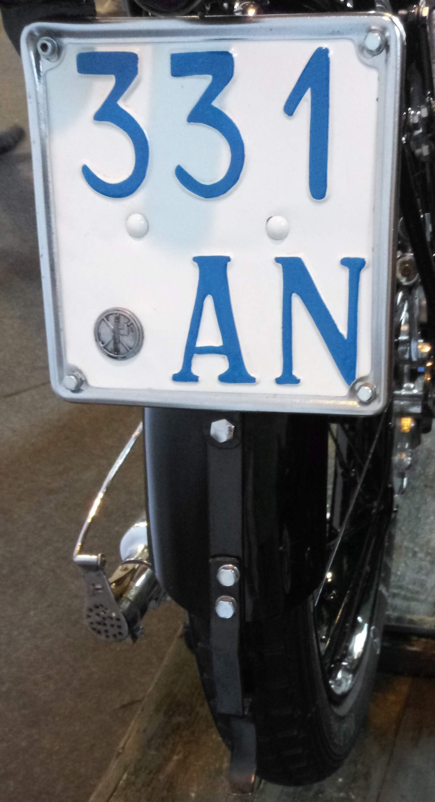 La foto rappresenta la targa di una Benelli 175 Sport dei primi anni '30 con formato introdotto nel 1932 e la numerazione sotto la sigla provinciale. Foto scattata ad "Auto e moto d'epoca" presso la fiera di Padova il 26/10/2019